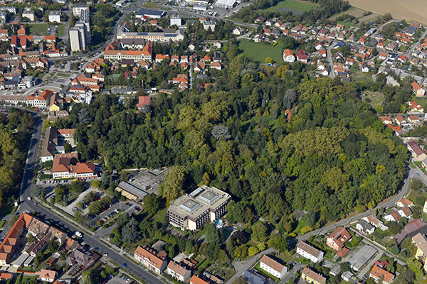 Sárvár, az arborétum légi felvételen